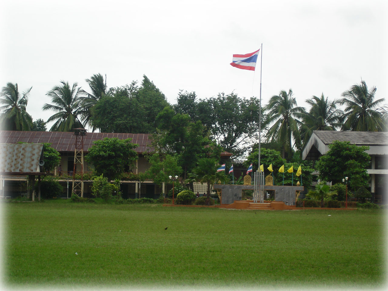 ภาพโรงเรียนพิพัฒน์ราษฎร์บำรุง